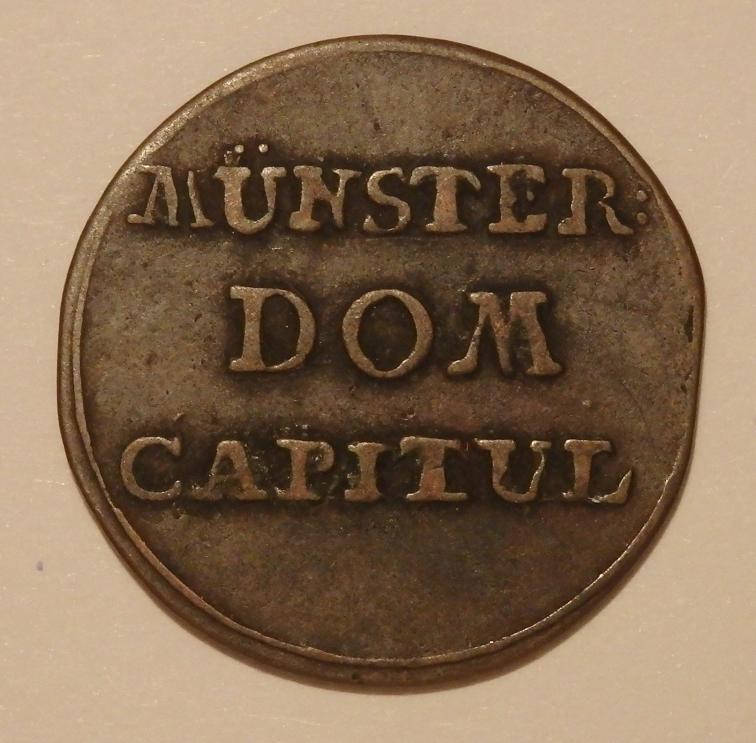 2 Pfenningmünze des Domkapitel Münster, Jahr 1790, Schön, Deutscher Münzkatalog, Nr. 17